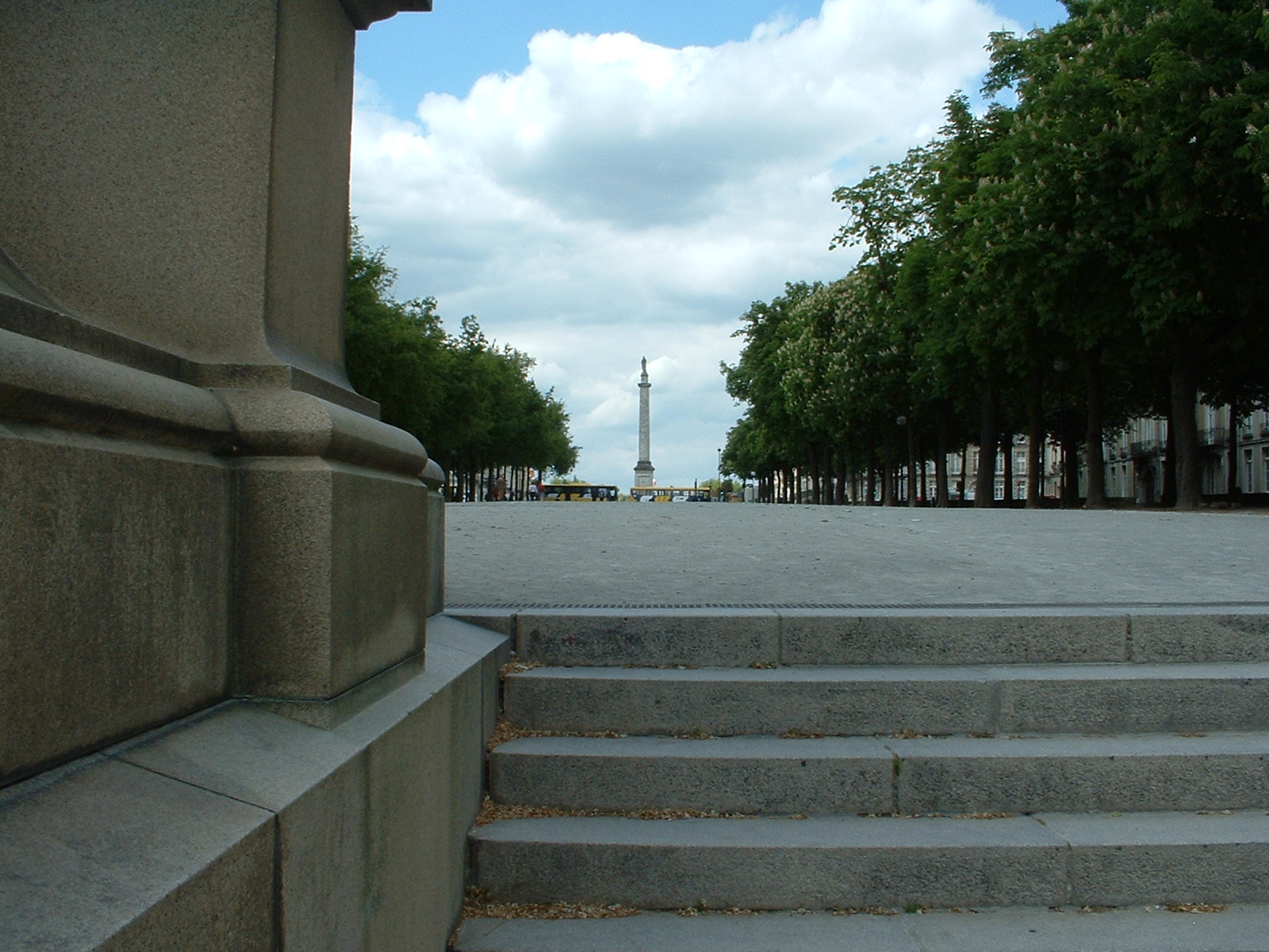 Nantes (France) - Socle monument aux morts 1870 au bas du cours Saint-Pierre